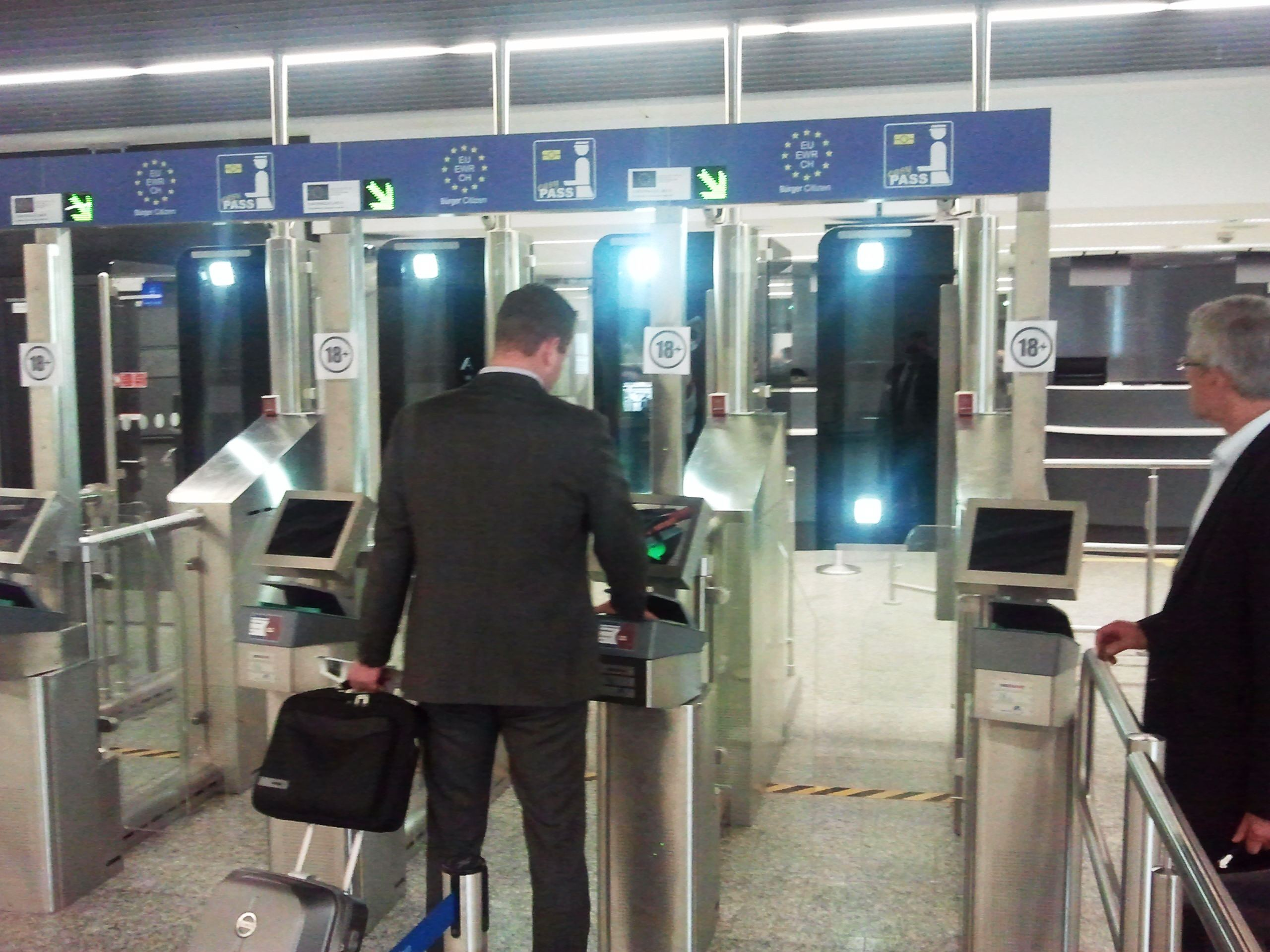 Das Foto zeigt EasyPASS mit einem Nutzer am Dokumentenlesegerät.